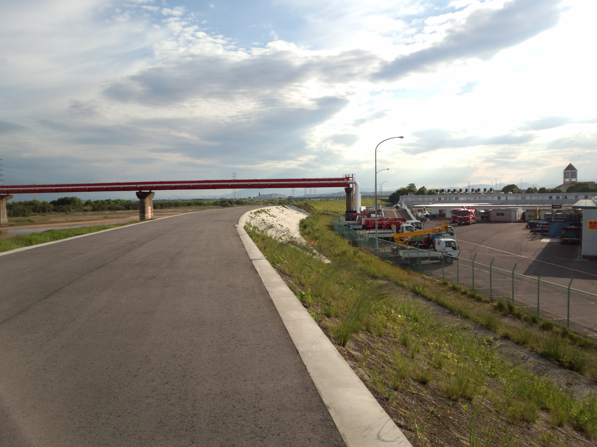 1945年8月8日模擬原爆着弾地 塩浜小学校の東約500ｍ